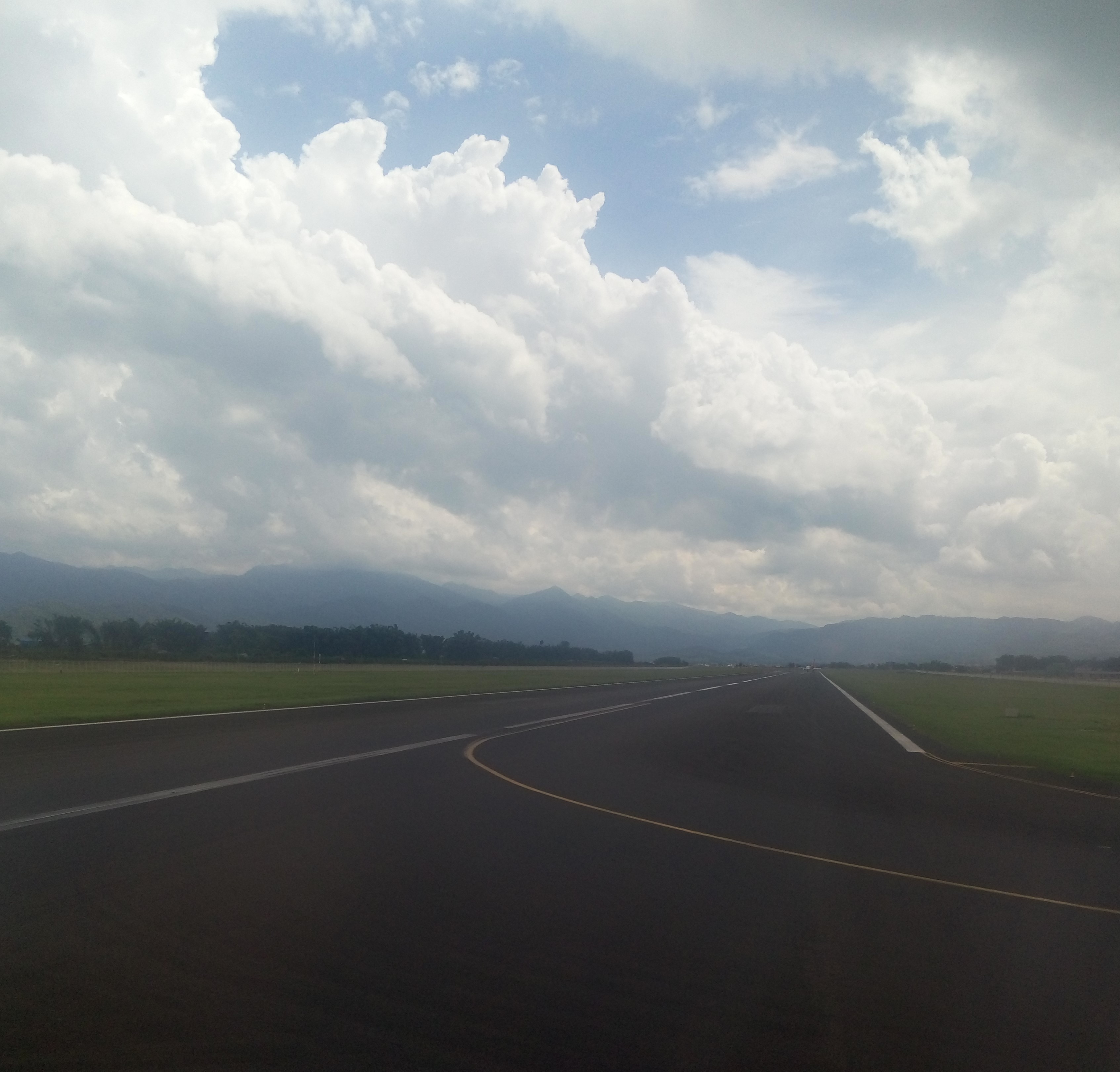 中文（中国大陆）: 德宏芒市机场的跑道